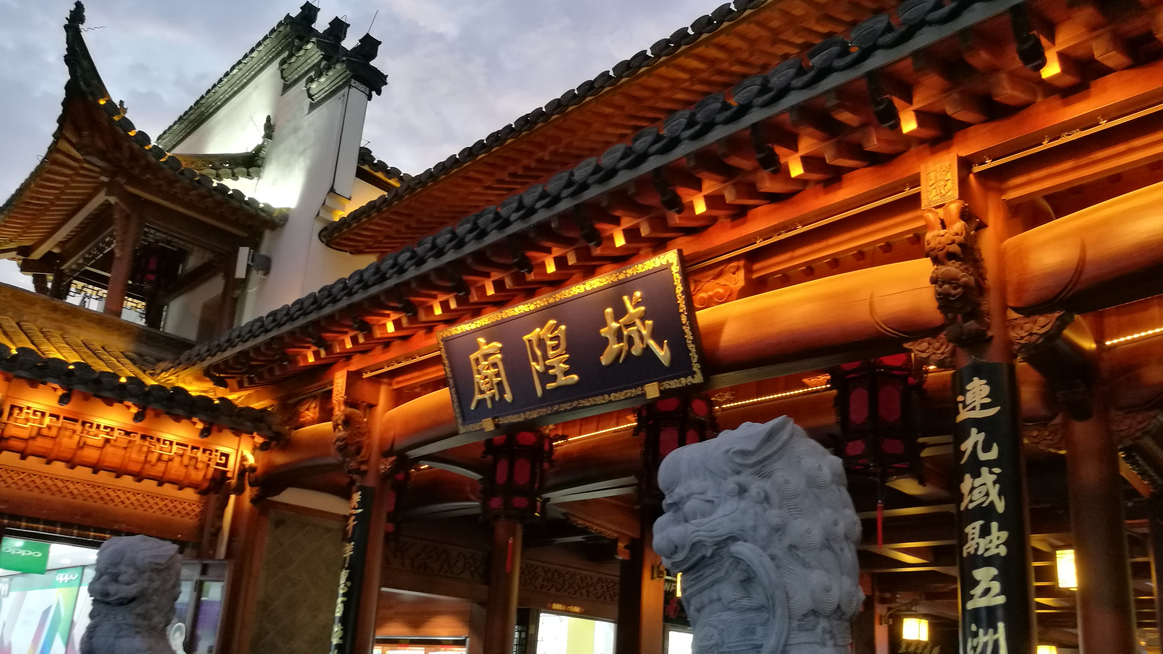 合肥城隍庙安庆路门